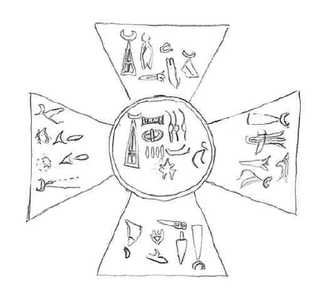 Bakside av korsseglet tilhørende Mursili II. Labarna og Tawananna står oppført i den øverste korsarmen.